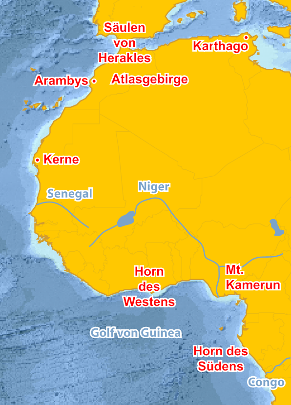 Karte der Reiseroute von Hanno, dem Seefahrer.